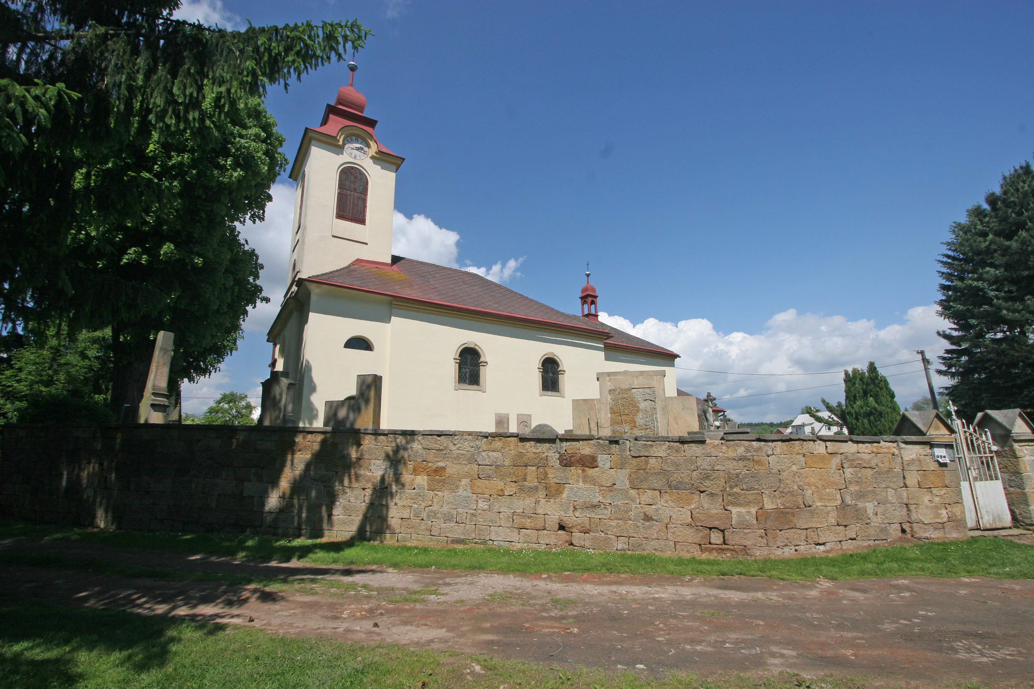 Kostel sv. Mikuláše (Choteč), Choteč